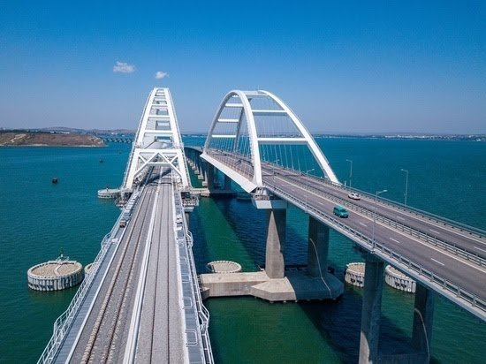 Крымский мост. 23 августа 2019 года